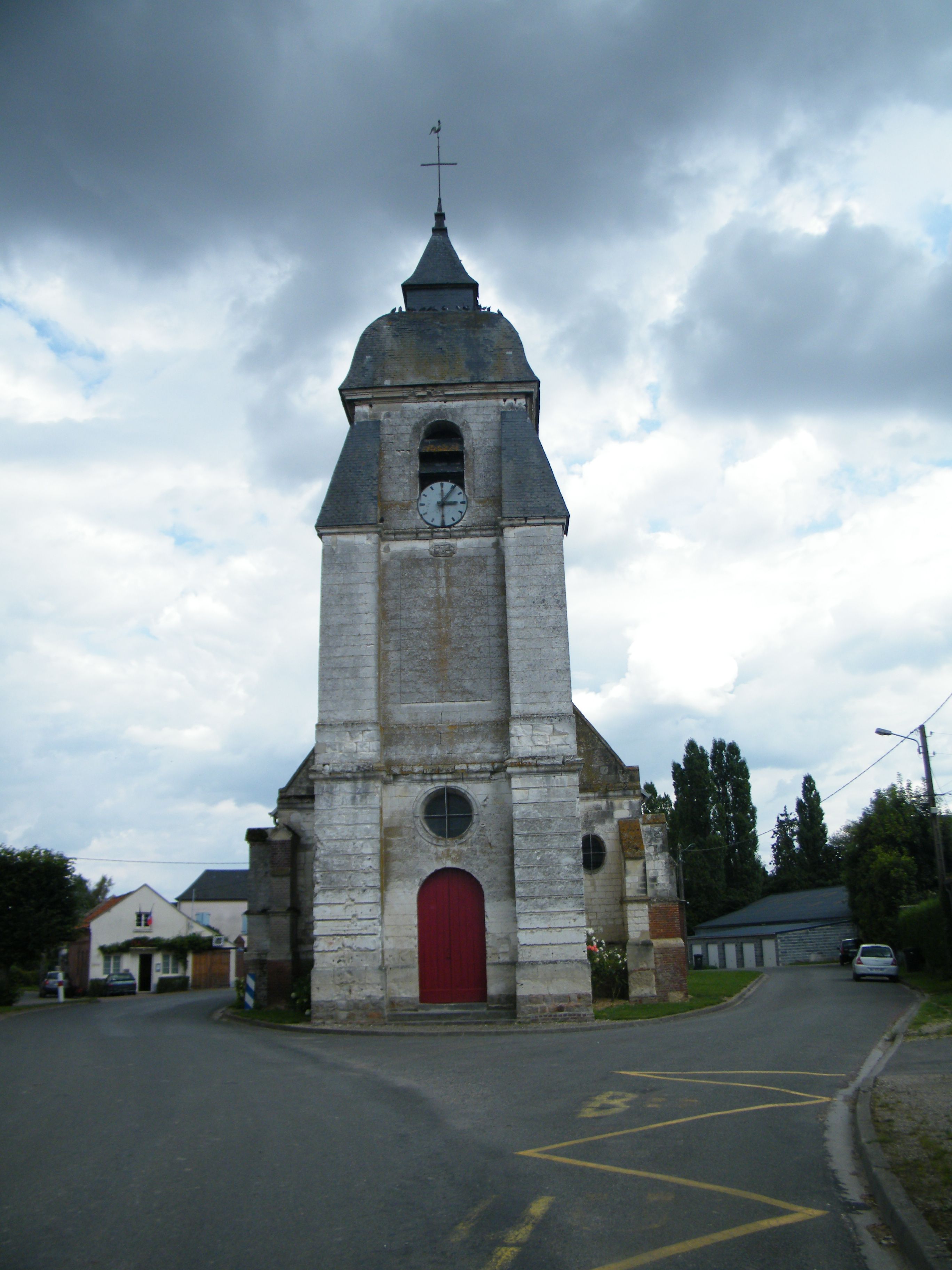 église.